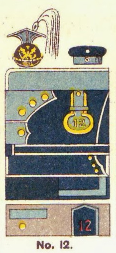 Schematische Farbdarstellung der Uniform des Litthauischen Ulanen-Regiments Nr. 12